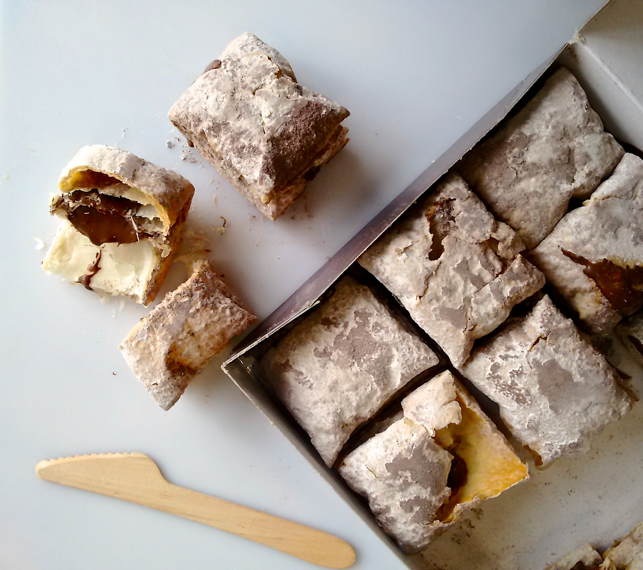 Fabricados artesanalmente en Albacete, nuestros Miguelitos te llegan en una caja de 12 unidades y duran 4 meses - si consigues no zampártelos todos de golpe!